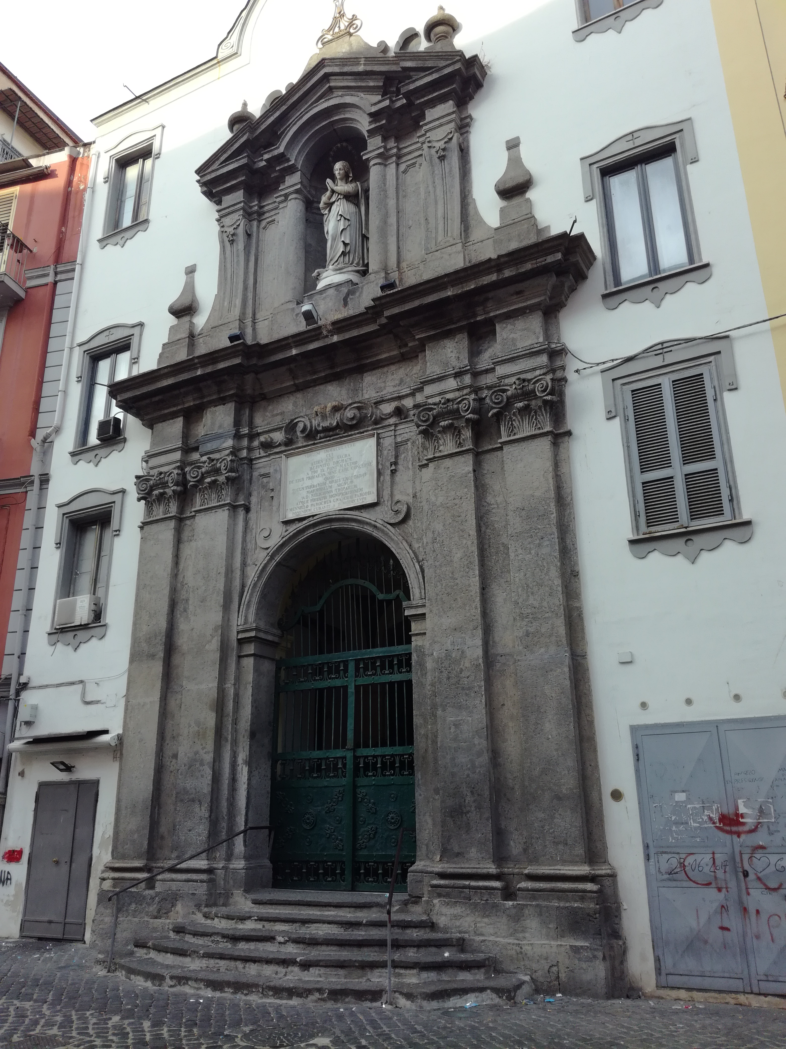 Facciata in piperno di Santa Maria dei Vergini